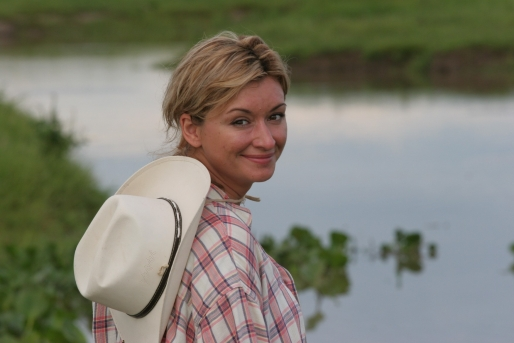 Martyna Wojciechowska, umieszczono w związku z informacją podaną na stronie "Dyskusja:Martyna Wojciechowska" wikipedysty 'Akira', o zgodzie na udostępnianie zdjęć ze strony